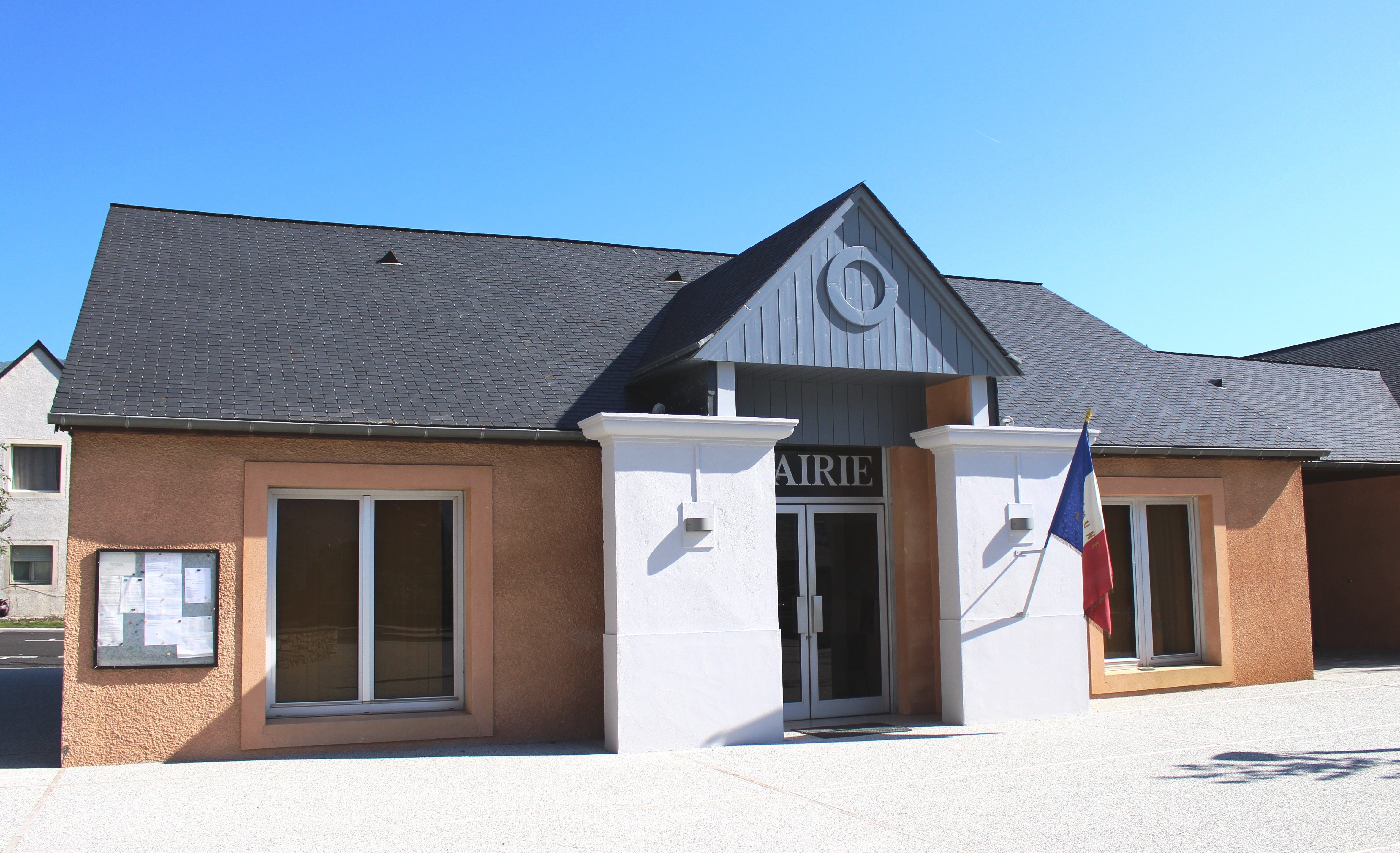 Mairie de Lau-Balagnas (Hautes-Pyrénées)